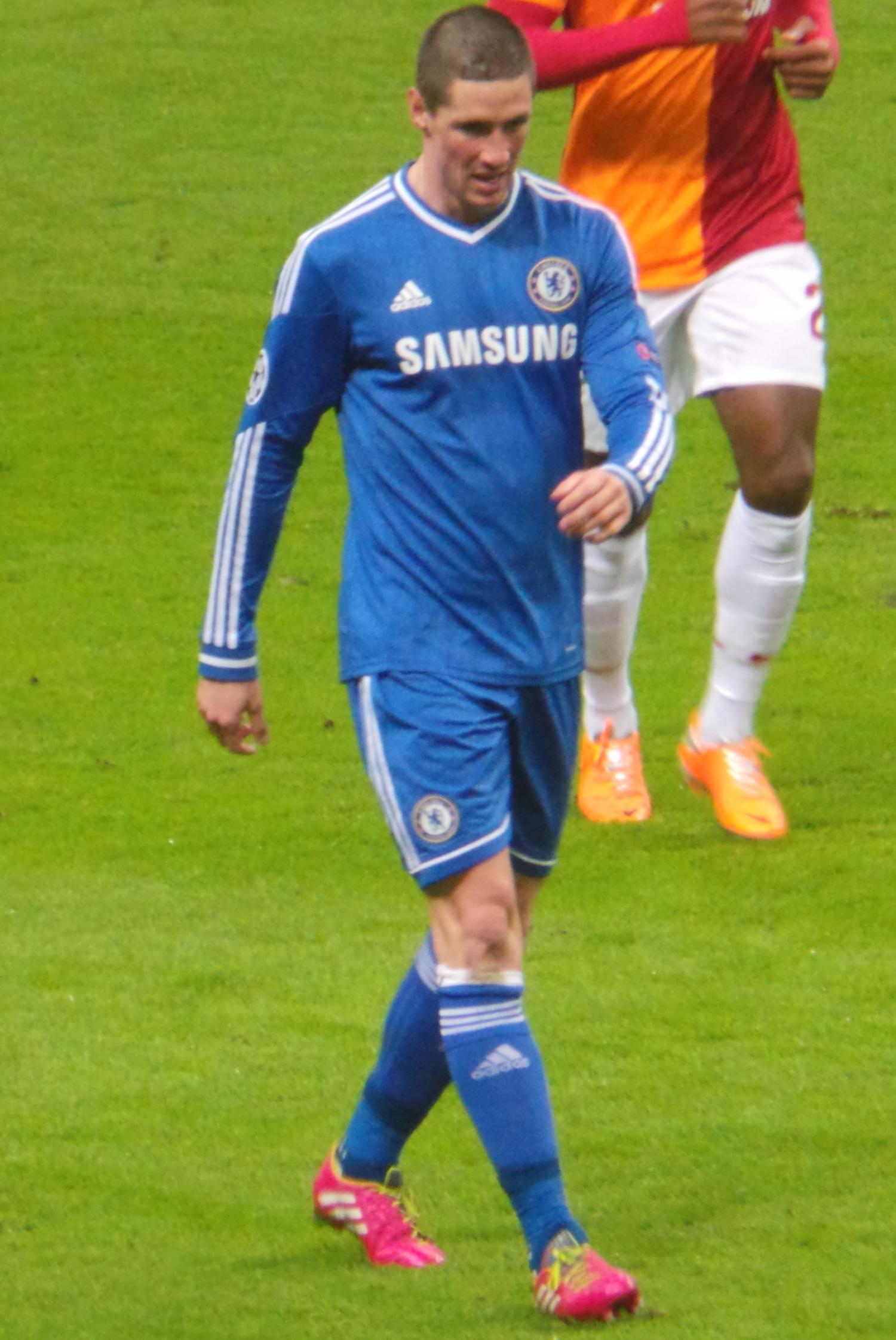 Torres'14